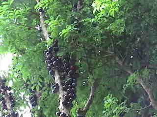 Jubuticaba. Foto obtida em 2005, em Curitiba, Pr - Brasil, por Altevir Vechia